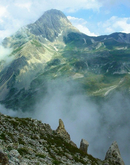 De Gran Sasso gezien vanaf de Monte Cefalone categorie:Afbeelding Abruzzen